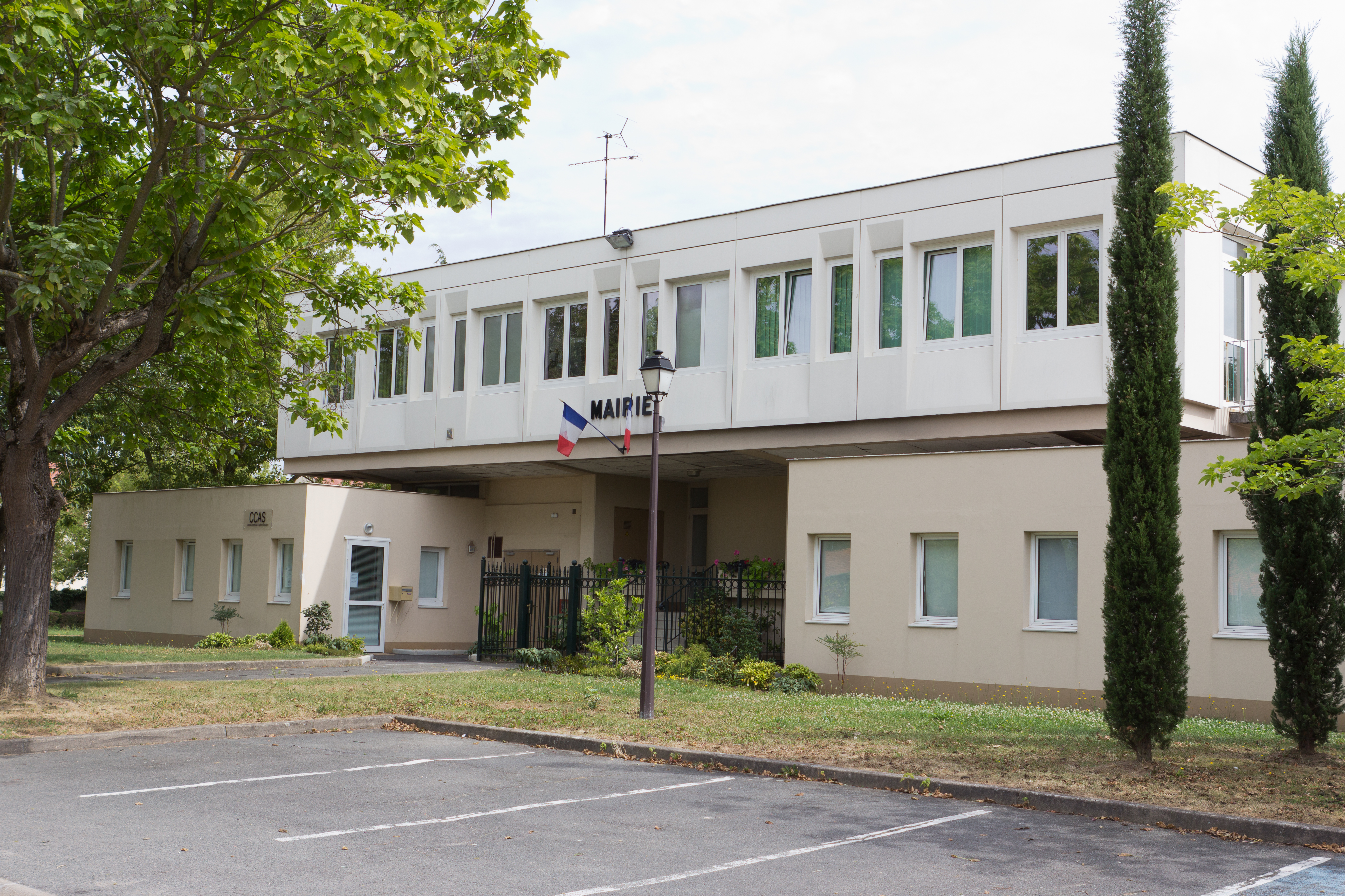 Mairie du Plessis-Pâté, commune du Plessis-Pâté, département de l'Essonne. France.